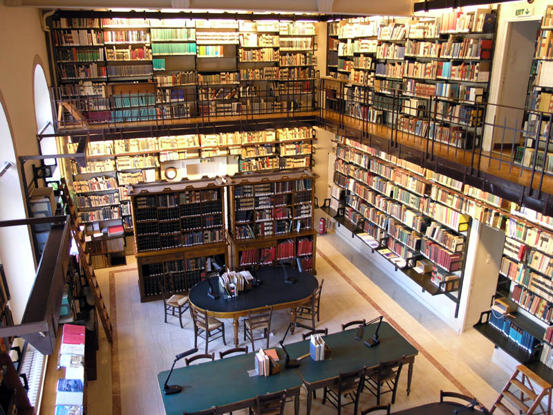 Bibliothèque de l'École française d'Athènes — salle de lecture A.